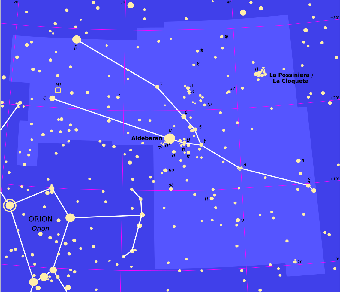 Constellacion dau Taure.